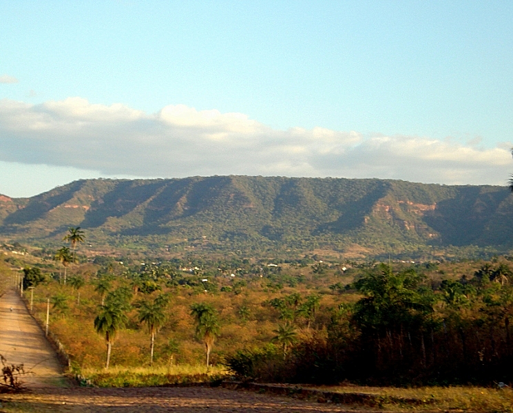 Vista parcial da Chapada do Araripe a partir de uma rua num dos bairros altos do Crato, ao sopé da serra.